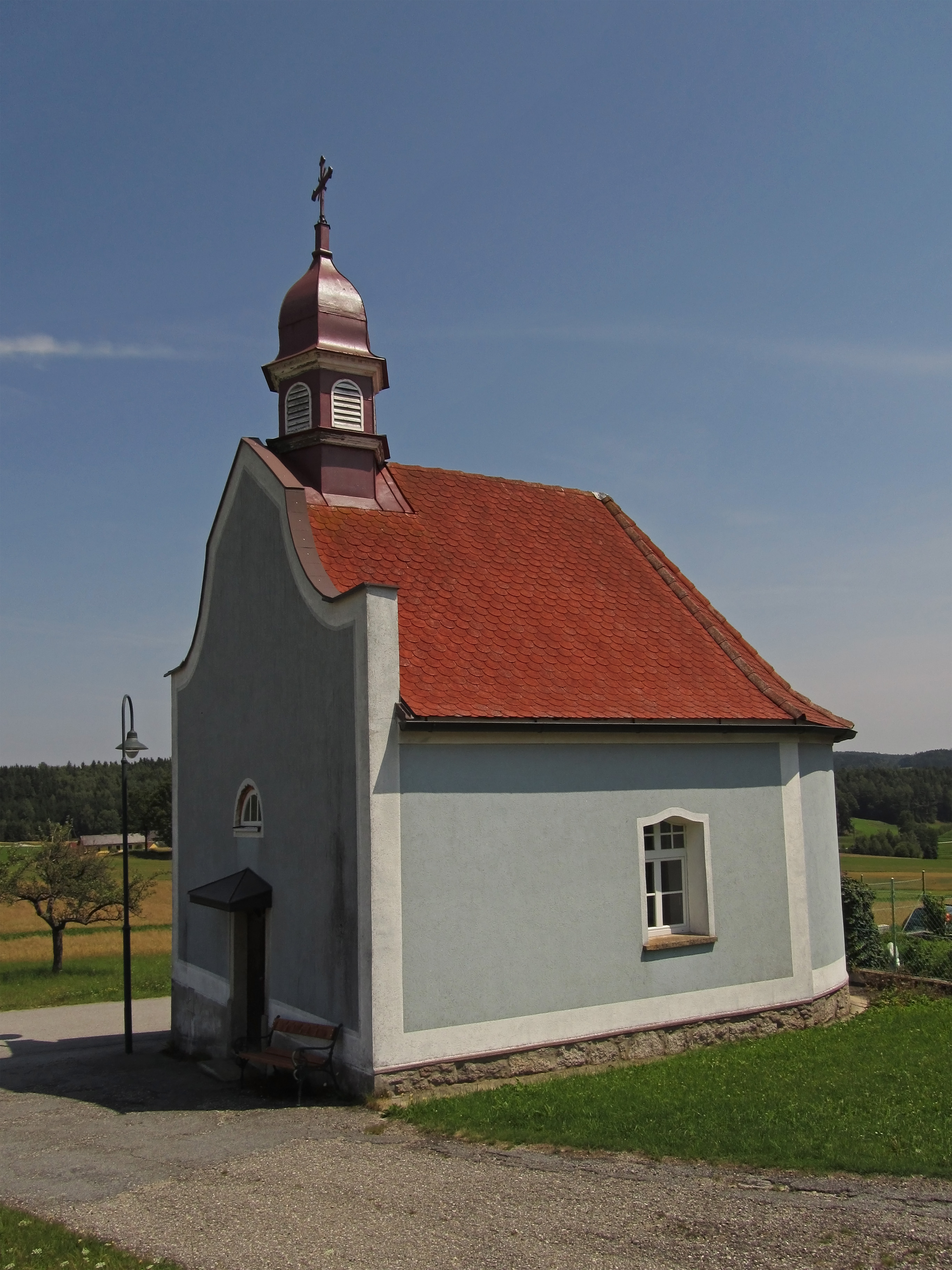 Die Kapelle wurde 1844 errichtet.